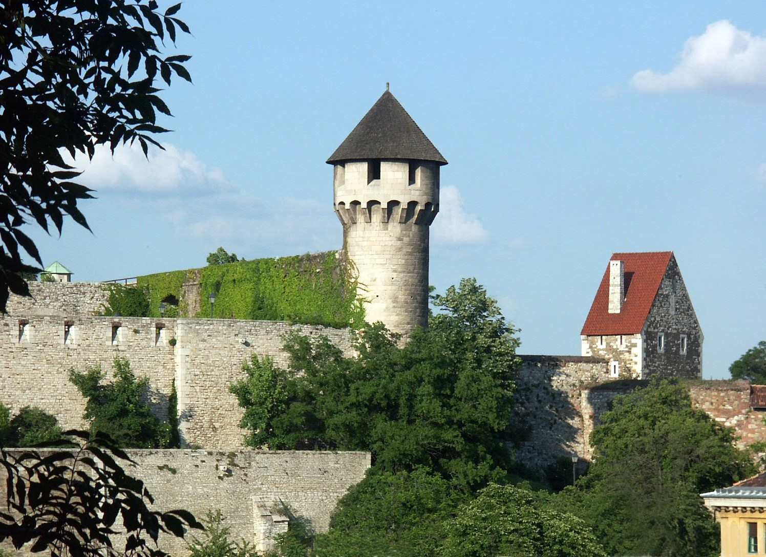 A Budavári Palotát körülvevő erődrendszer, Budapest I. kerület This is a photo of a monument in Hungary. Identifier: 17269